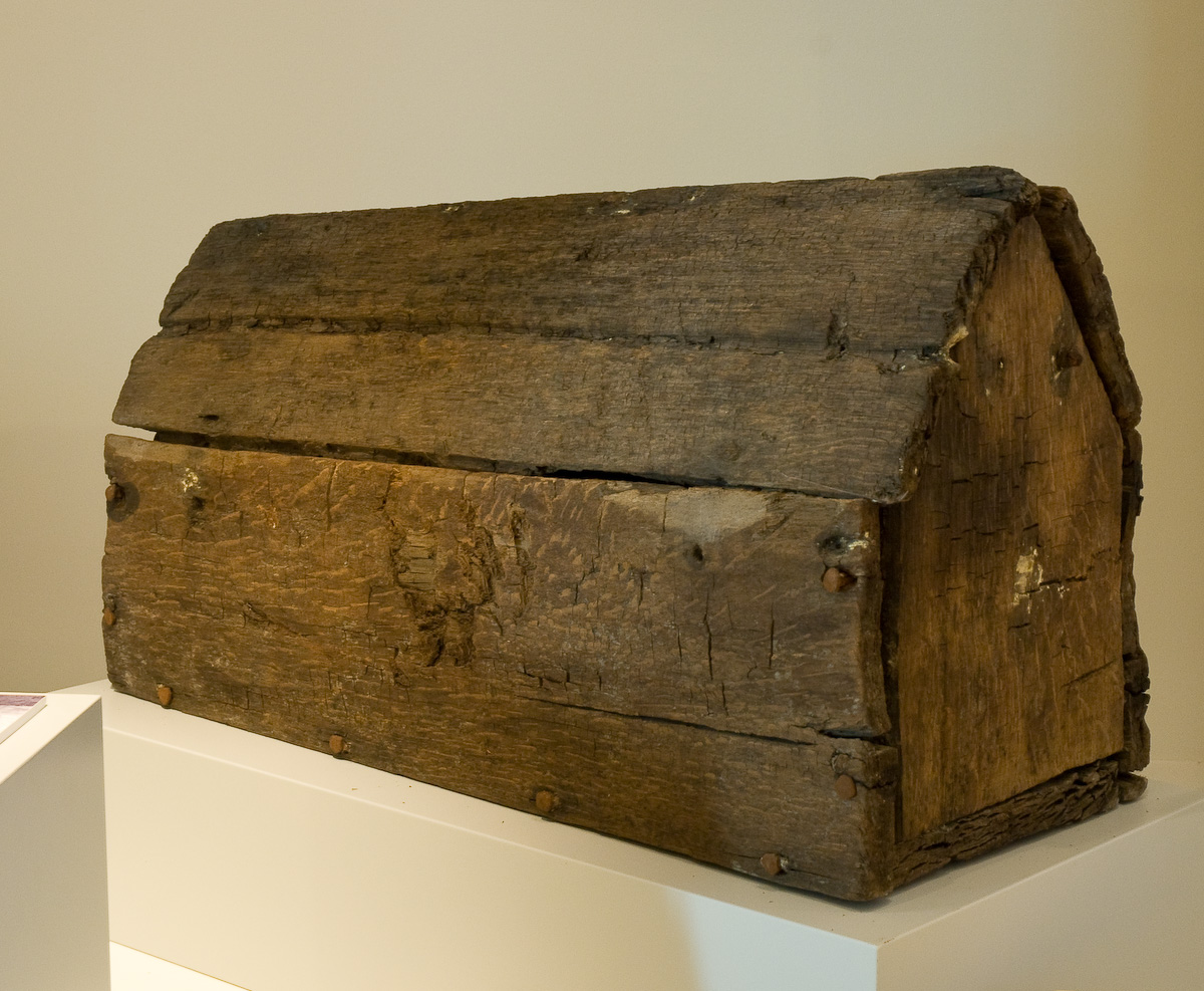 Kinder grafkistje (70×40x50 cm), ca 1600 kindergrafkistje 70 x 40 x 50 cm ca 1600